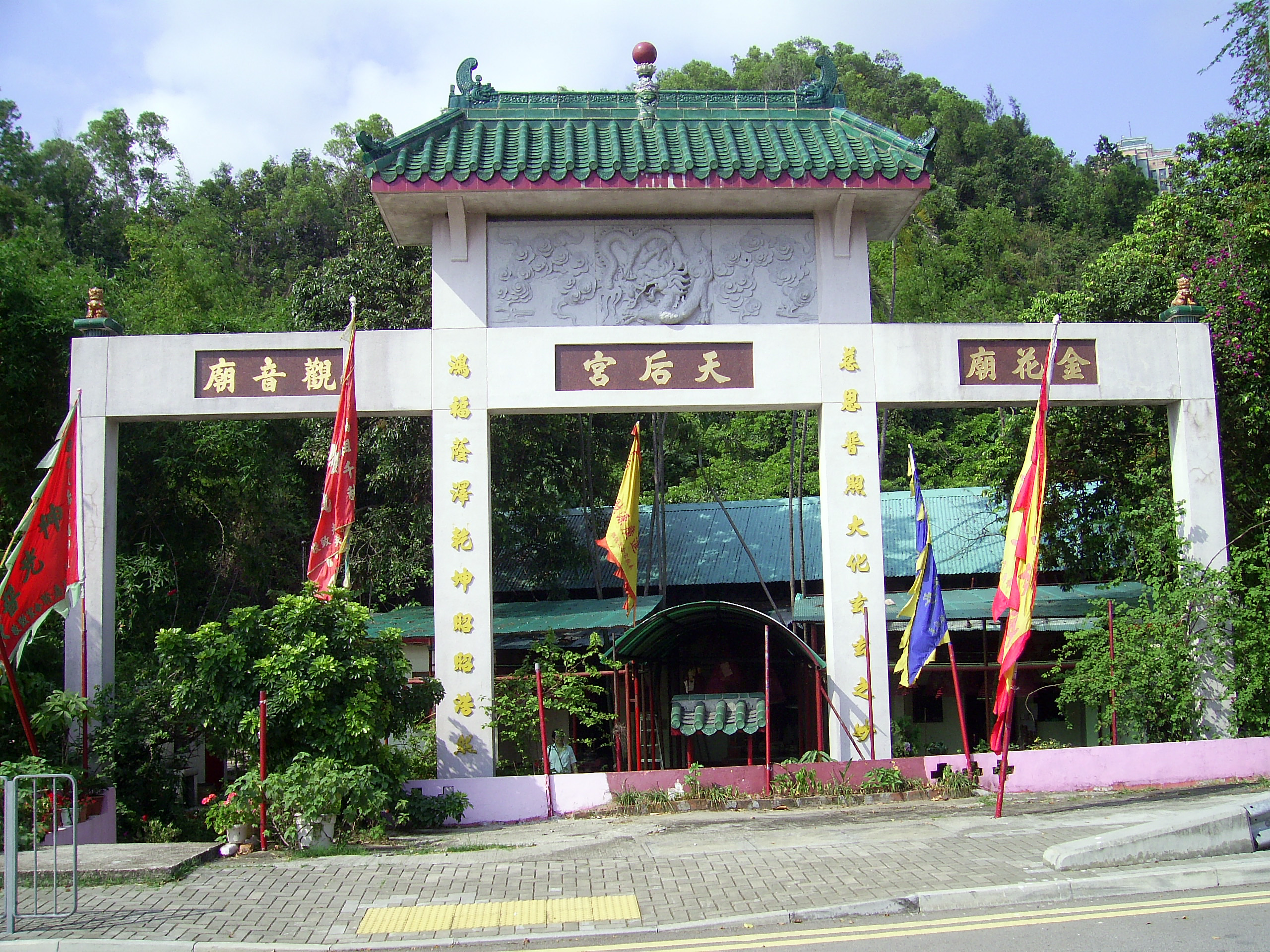 中文（香港）: 青龍頭天后宮